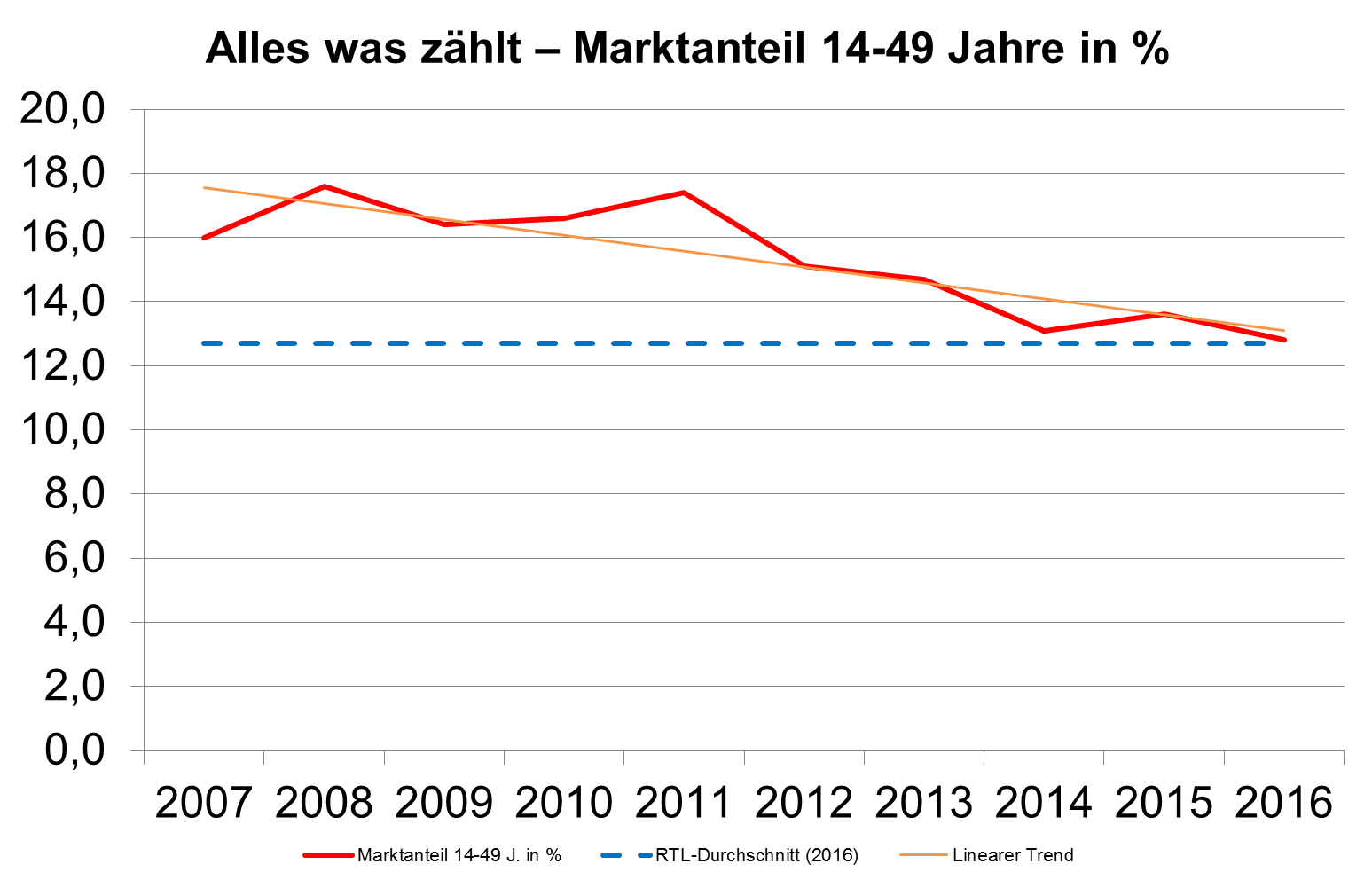 Diagramm zu den Jahresquoten von Alles was zählt